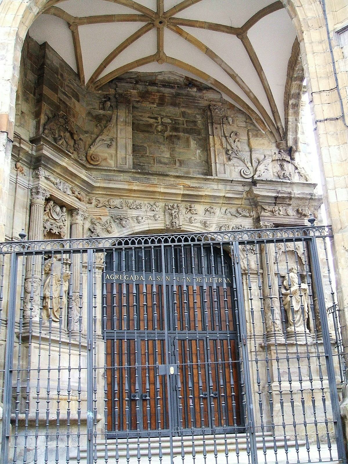 Pórtico viejo, iglesia de San Antón, Bilbao